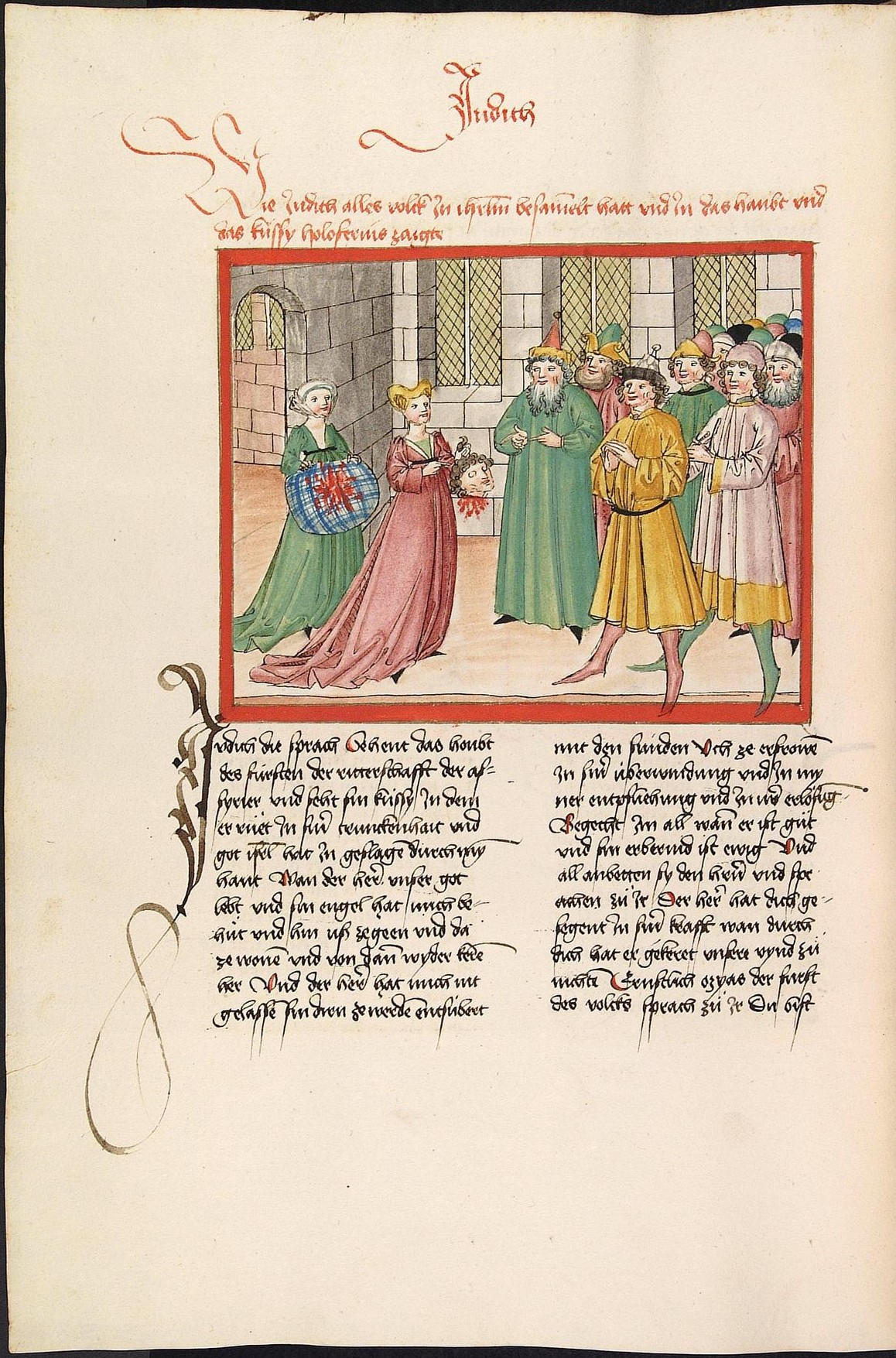 Codex Palatinus germanicus 17, Blatt 256v - Bibel, Altes Testament, Buch Judit: Judit zeigt dem Volk das Haupt des Holofernes. (Cpg 17 = Bibel AT, deutsch, Bücher Könige, Chroniken, Esra, Tobias, Judit, Ester, Hiob)